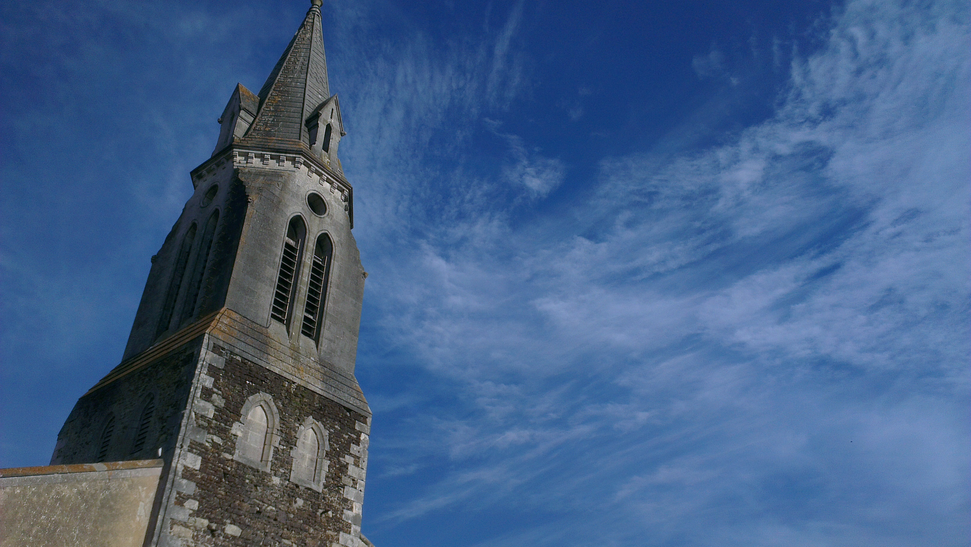 Photo de l'Eglise de Gujan Mestras